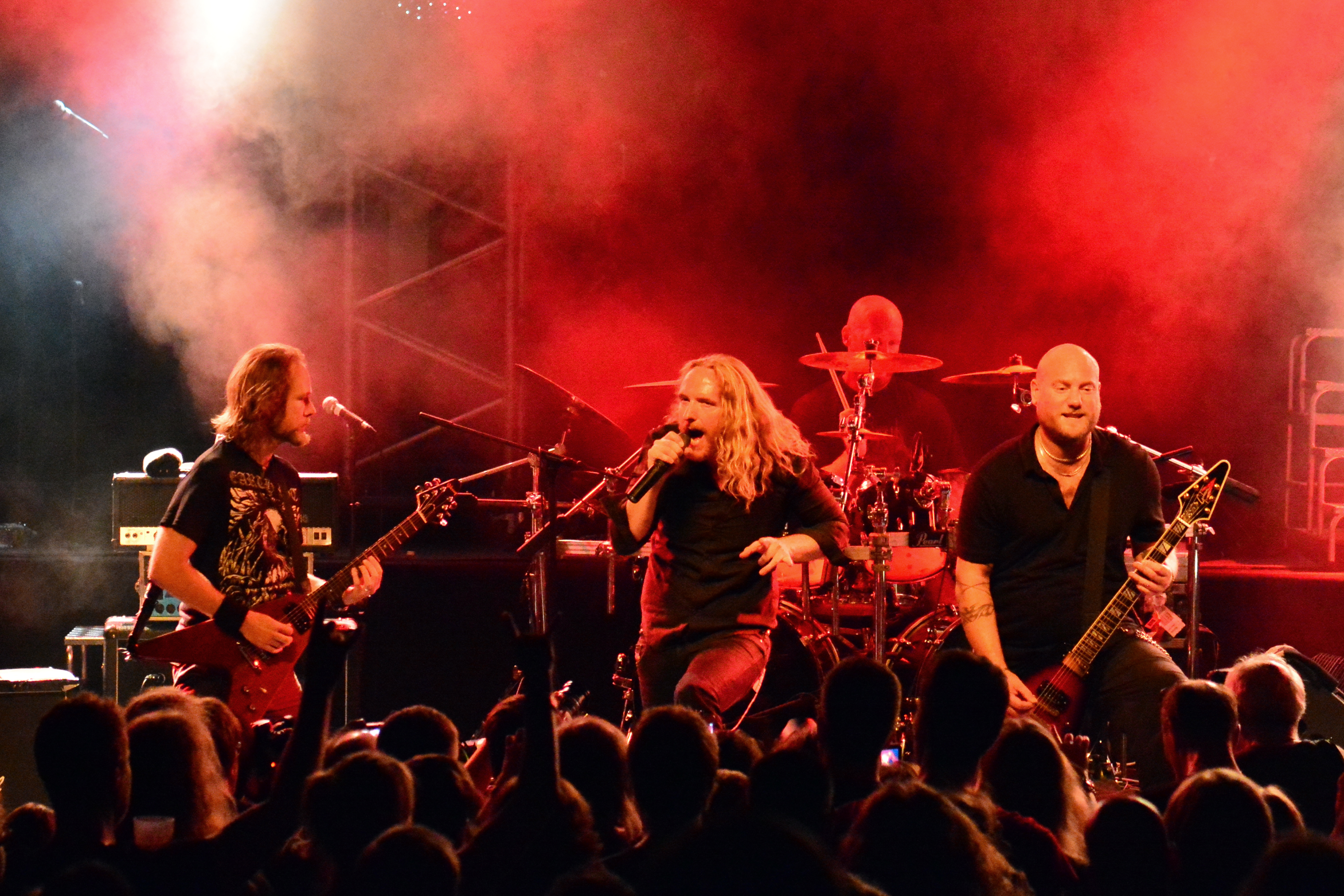 Dark Tranquillity bei den Hamburg Metal Dayz 2014